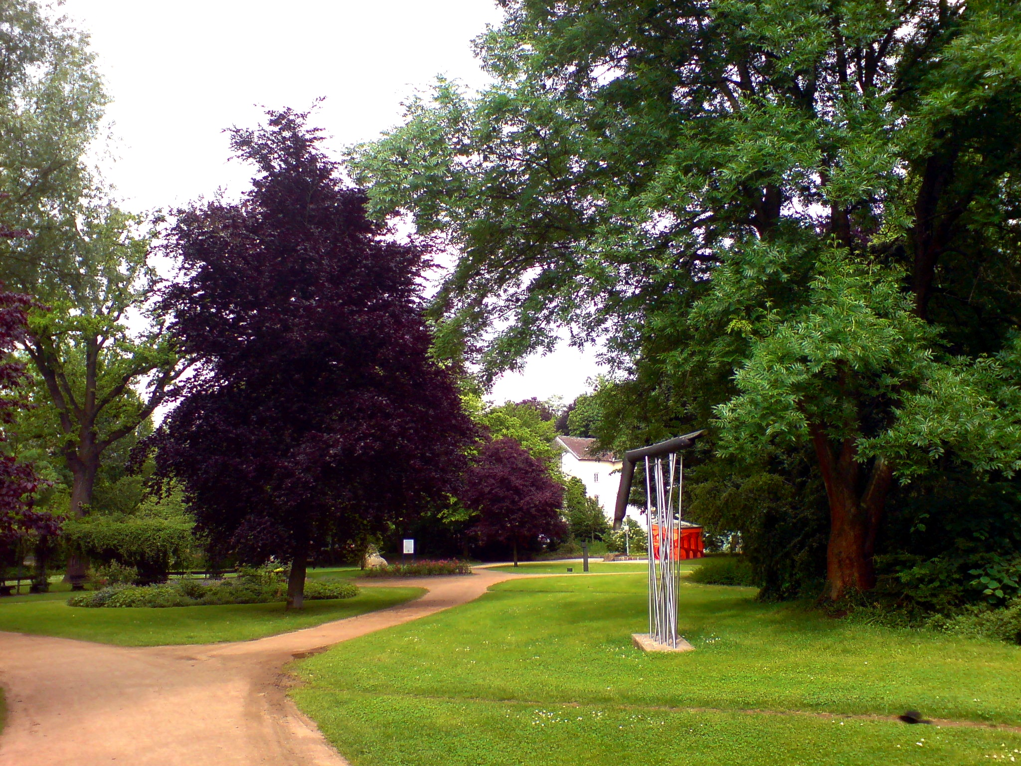 Colchester Anlage in Wetzlar(Hessen), Deutschland